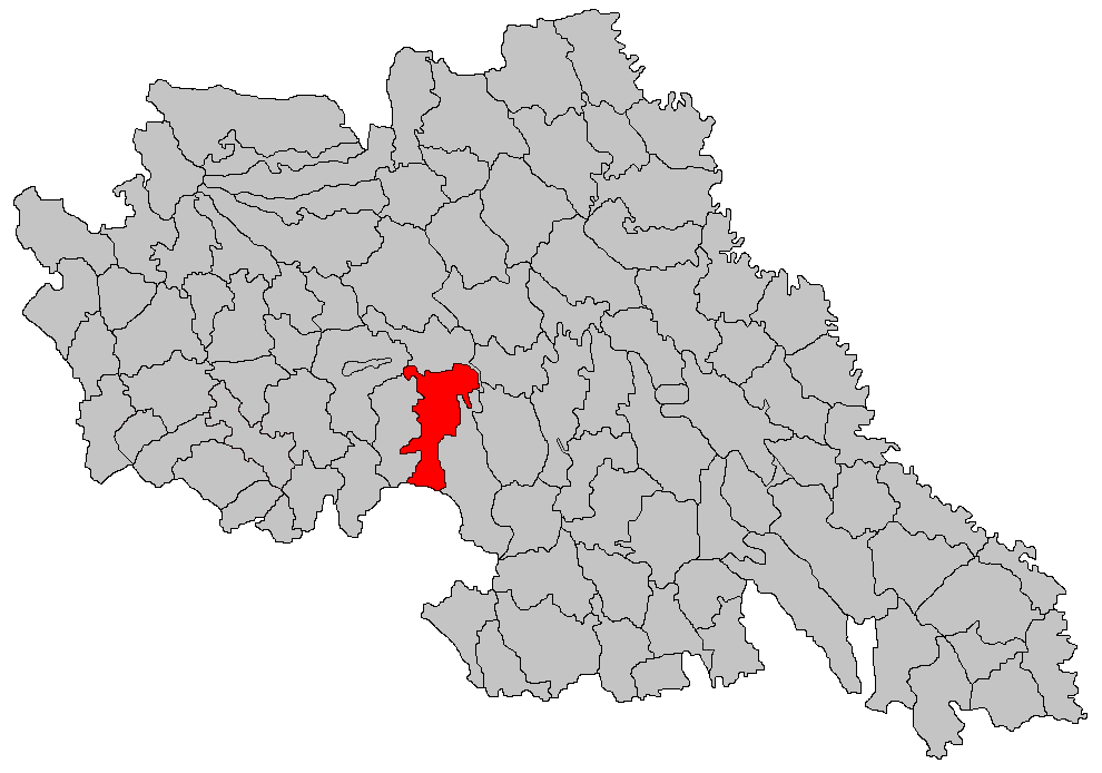 Categorie:Hărţi ale judeţului Iaşi